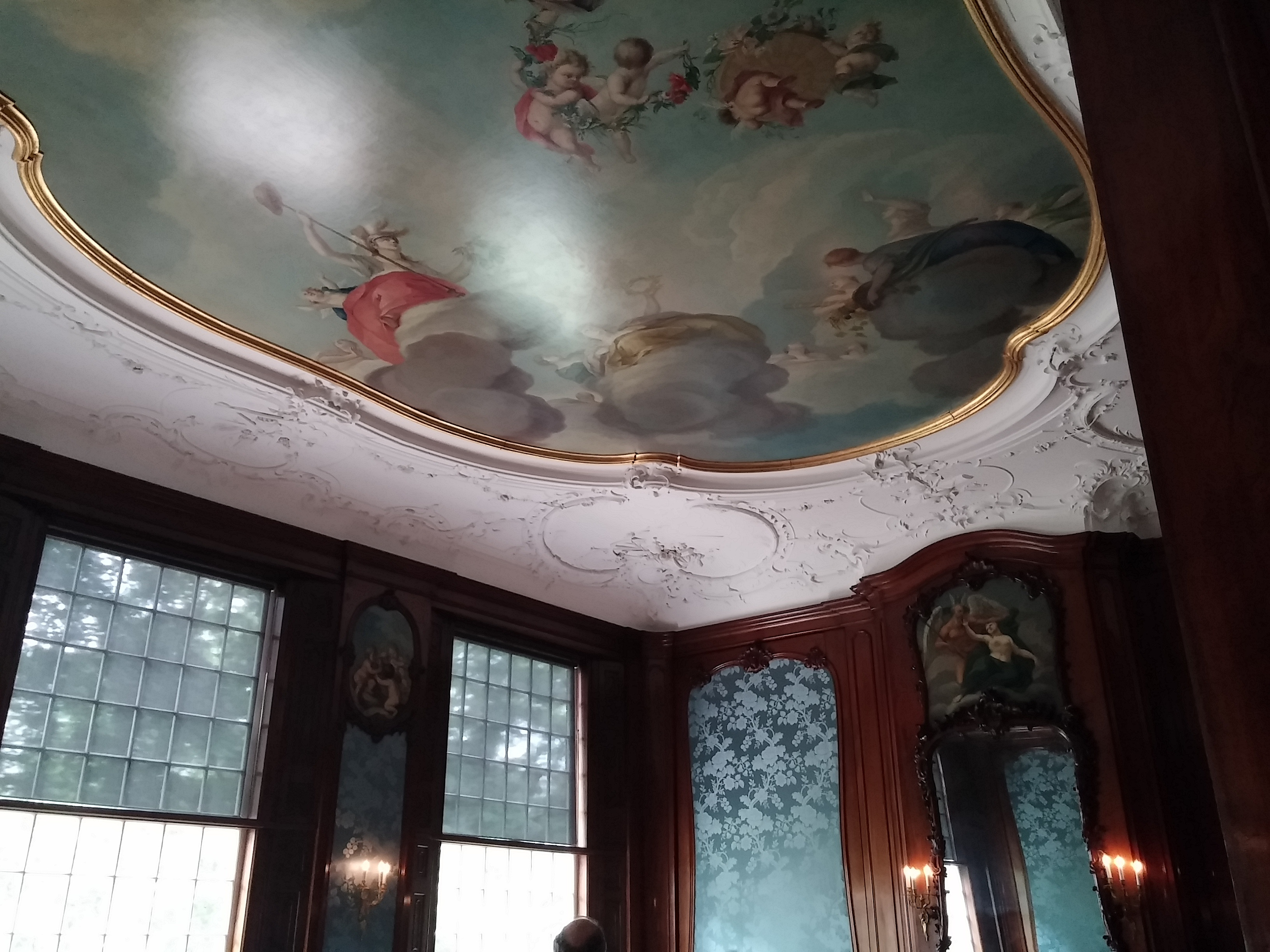 Plafondschildering van de stijlkamer achter (1e verdieping) in Huis Bartolotti aan de Herengracht te Amsterdam. Foto gemaakt op 16 juni 2018 bij de eerste openstelling van het pand voor leden van de Vereniging Hendrick de Keyser.